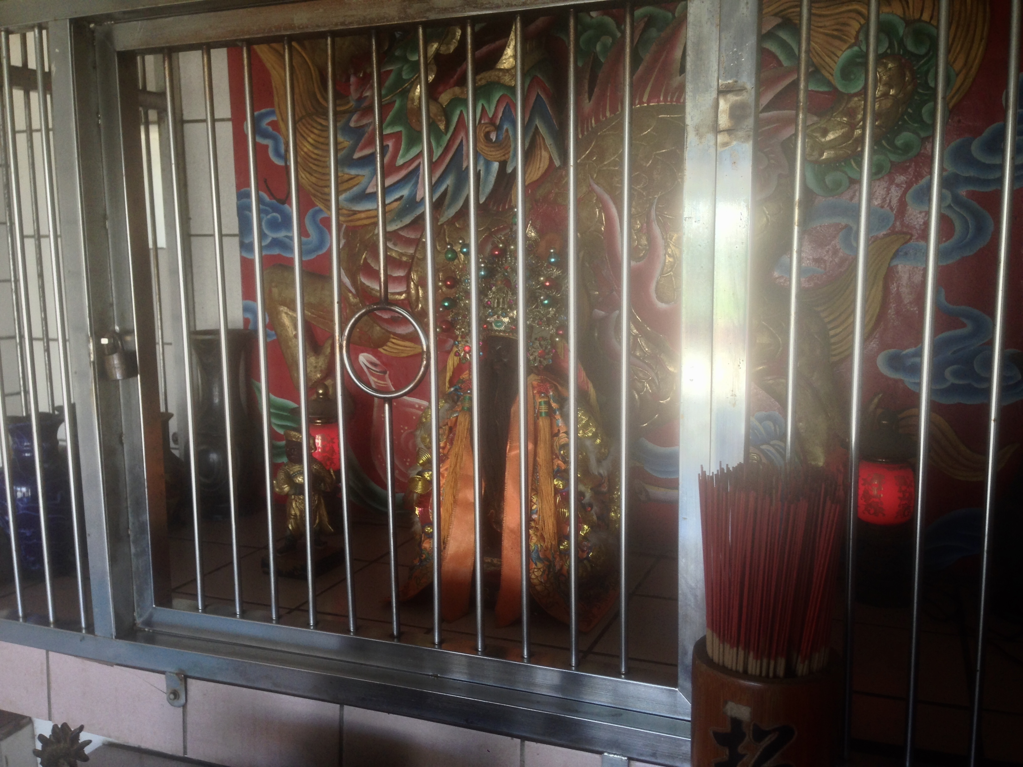 五結季新加禮宛大眾爺廟神像